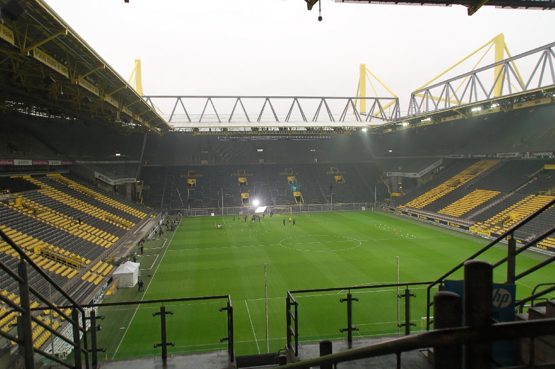 Signal Iduna Park 2013